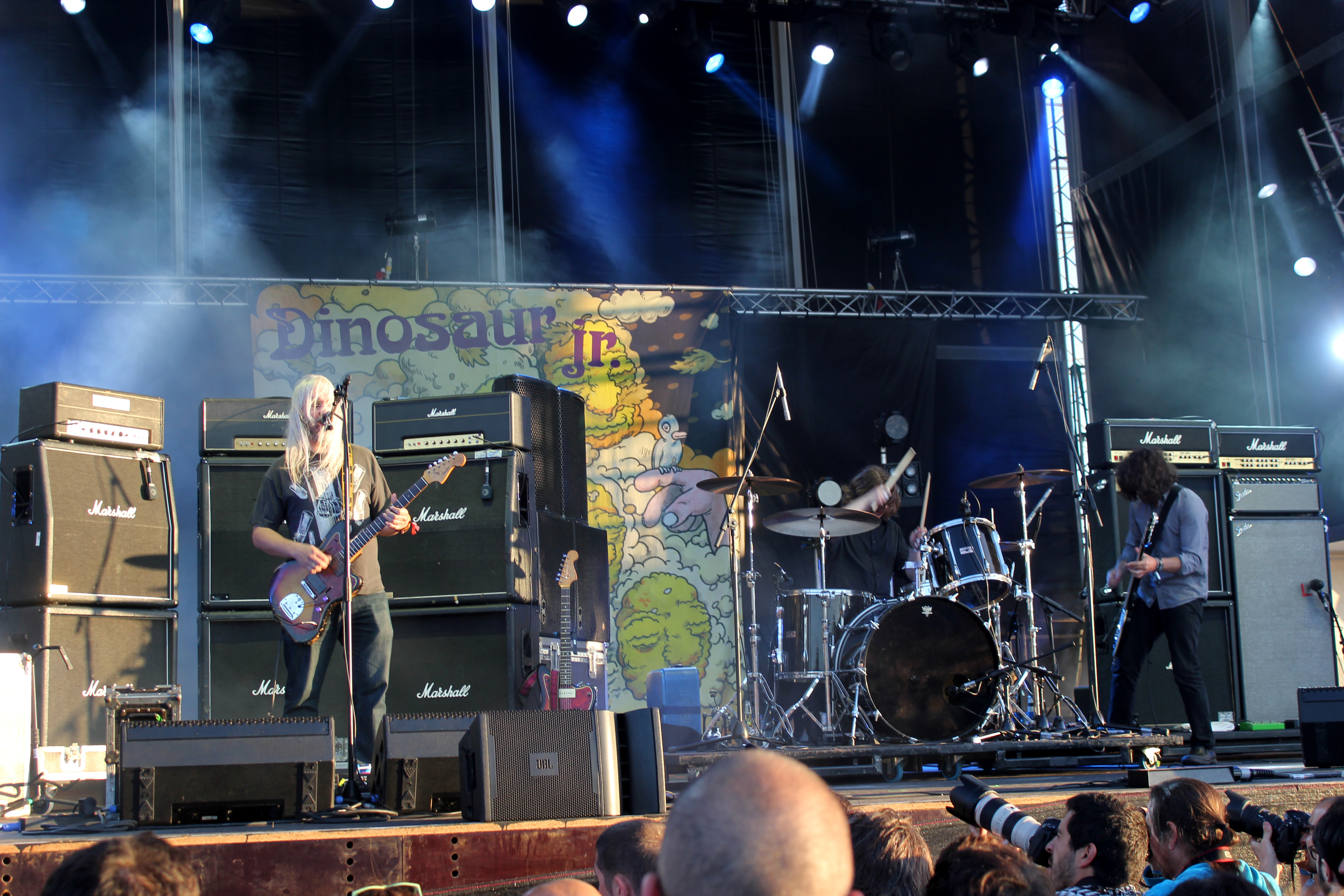 Dinosaur Jr. no festival Optimus Primavera Sound 2013.